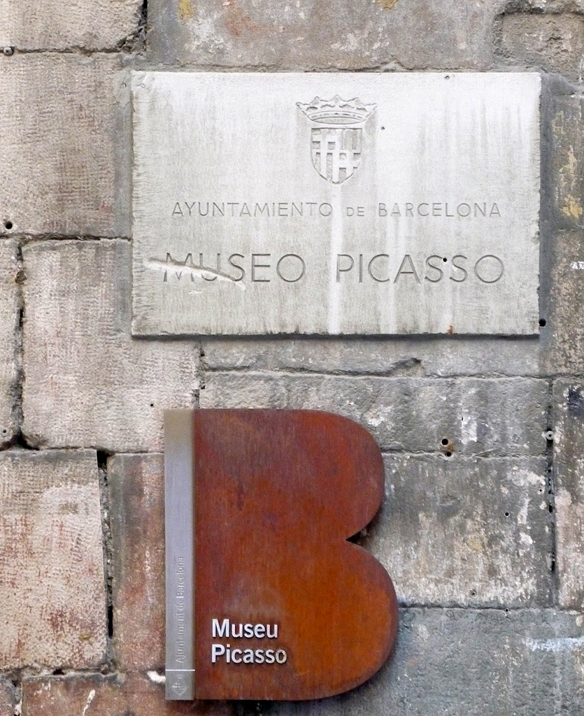 Museu Picasso